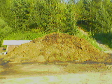 hnoj